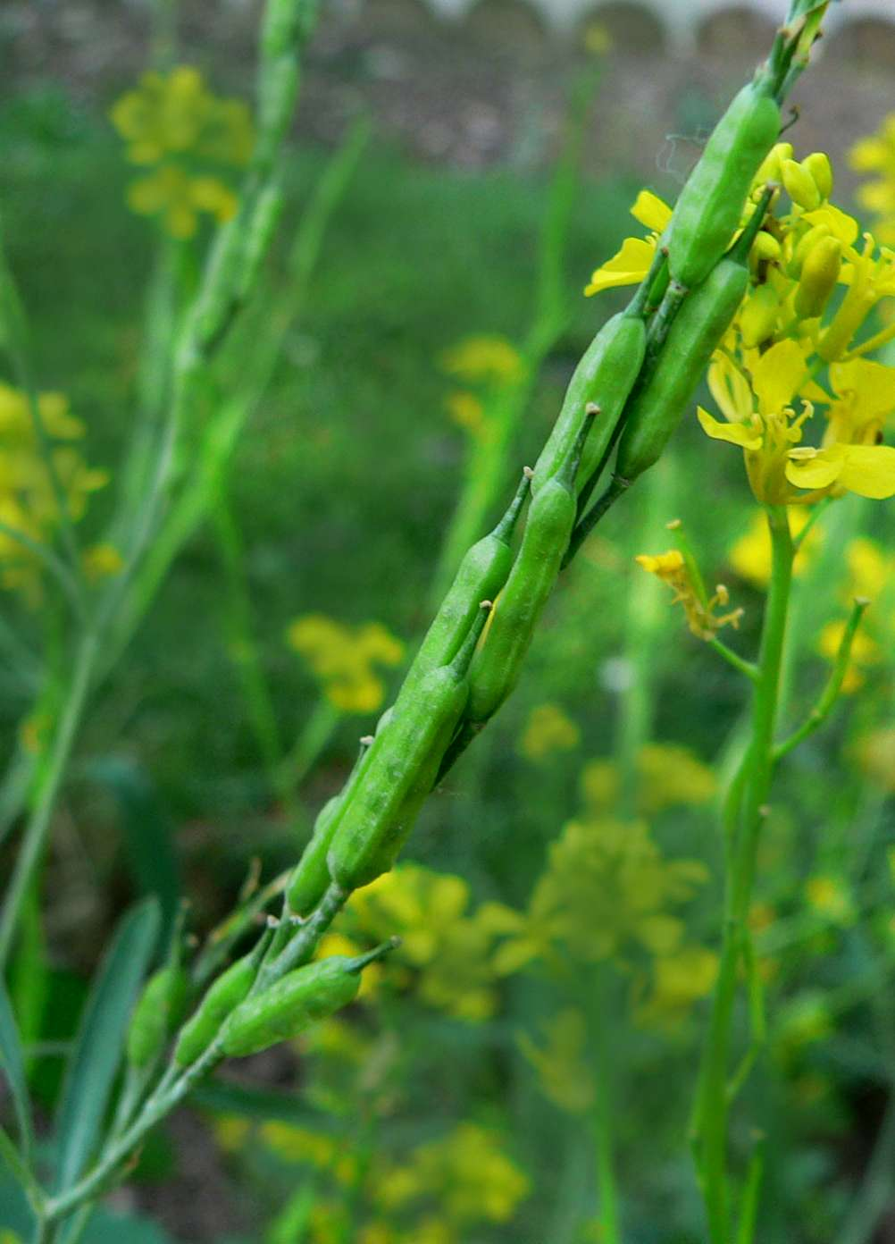 Brassica nigra, moutarde noire, siliques, Jardin des Plantes de Paris